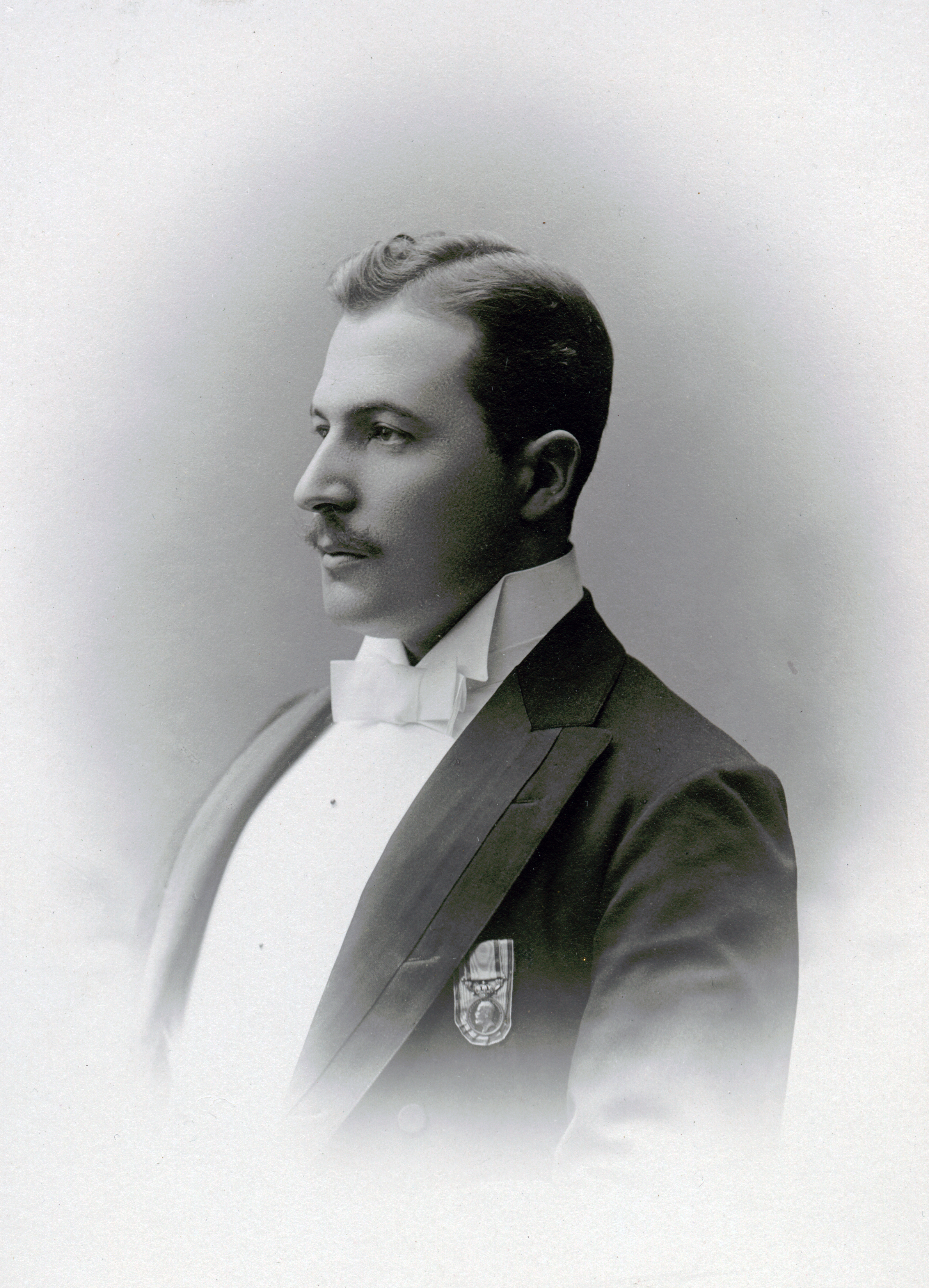 Knut Nyblom, skådespelare vid Vasateatern 1898-99